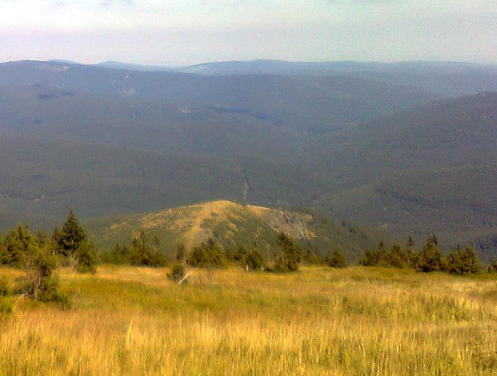 Widok z drogi na szczyt góry Praděd - 1491 m n.p.m. na połać szczytową góry Sokol - 1187 m n.p.m. (na pierwszym planie)